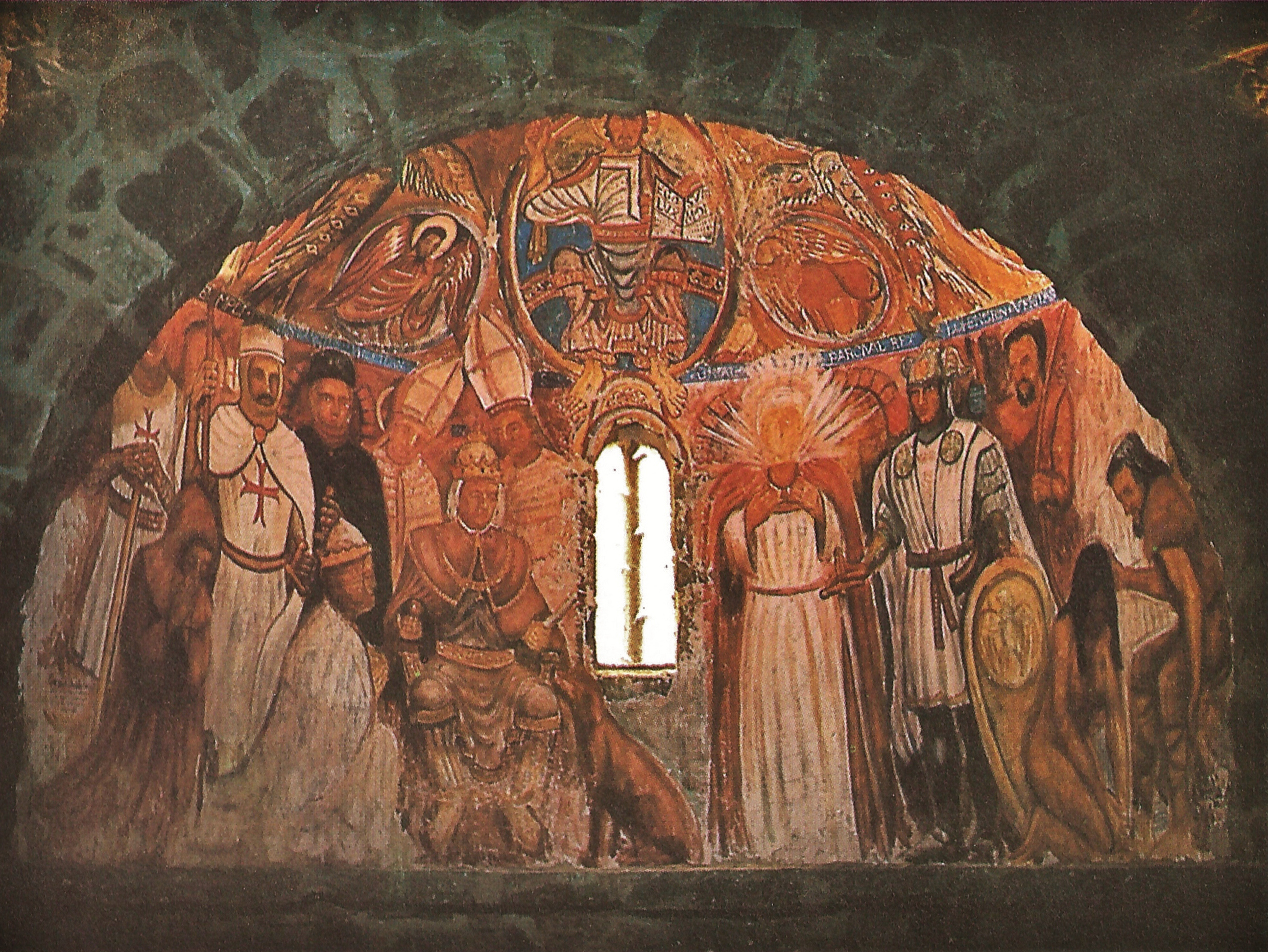 Primeres pintures murals al fresc d’en Carles Arola, realitzades l’any 1982. Els frescos decoren un absis de la capella particular de La Manyosa, masia del terme de Granera. La composició es divideix en dos: la part superior de l’absis amb la típica mandorla i tetramorf en homenatge al romànic català. A la part inferior, trobem a l’esquerra del finestral una temàtica medieval amb els cavallers del Temple, i uns bisbes i abats, Bernat de Claravall i Joaquim de Fiore. A la part dreta la temàtica és mes Wagneriana, la llegenda escrita per Cristian de Echembac, sobre el Parsifal i el mite de la redempció i purificació de l’home per l’amor.Hi apareixen els personatges de Parsifal, Lohengrin, Kundry i el Rei Amfortas.